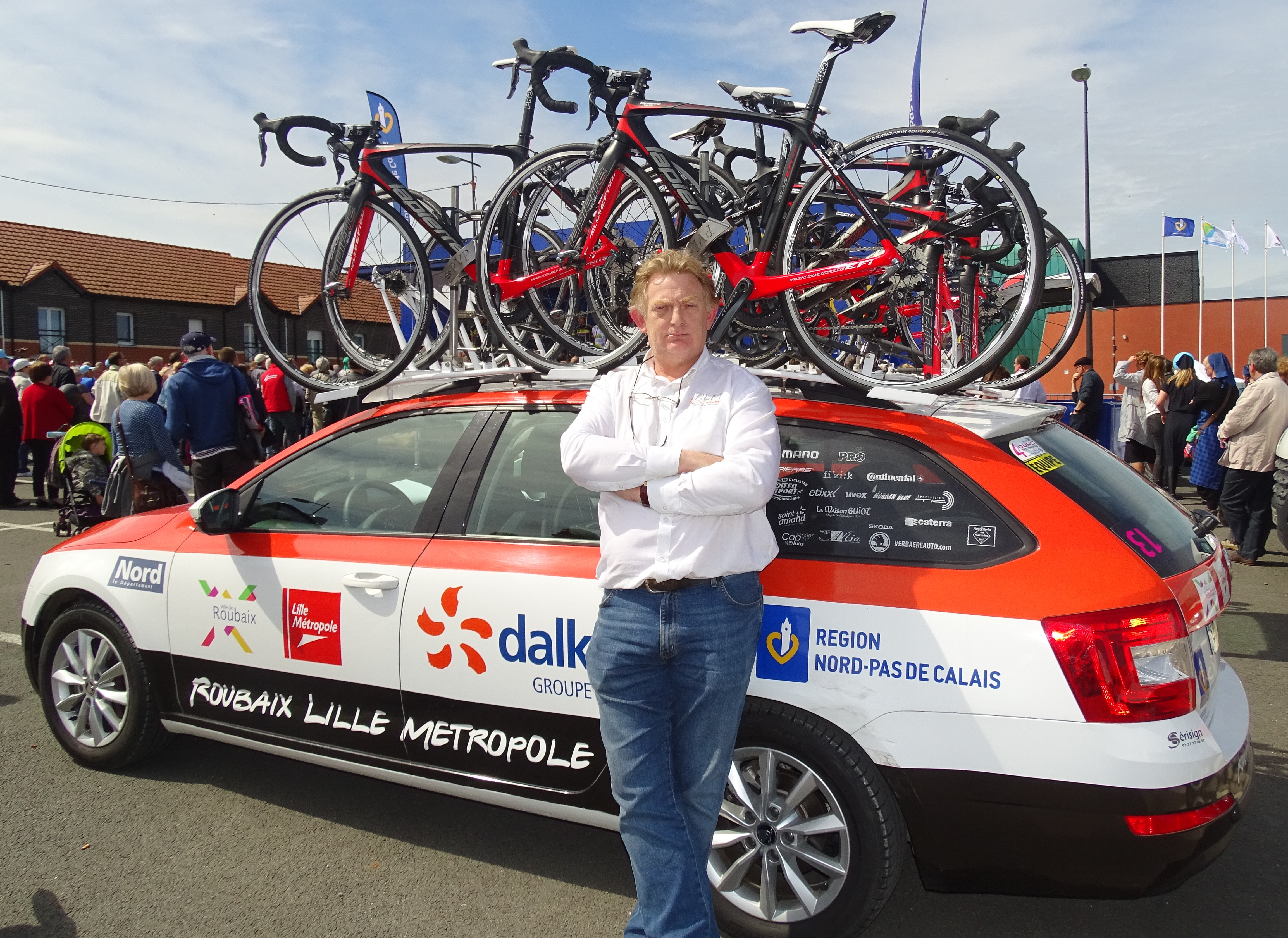 Reportage réalisé le vendredi 8 mai 2015 à l'occasion du départ de la troisième étape des Quatre jours de Dunkerque 2015 à Barlin, Pas-de-Calais, Nord-Pas-de-Calais, France. Depicted person: Frédéric Delcambre Depicted team: Roubaix Lille Métropole